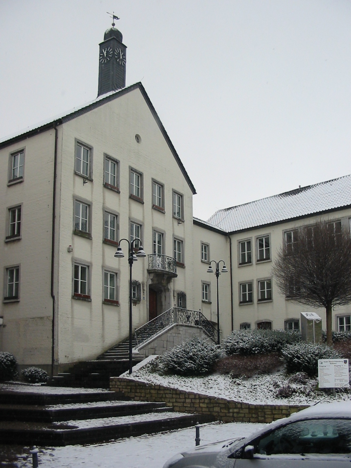 Übacher Rathaus